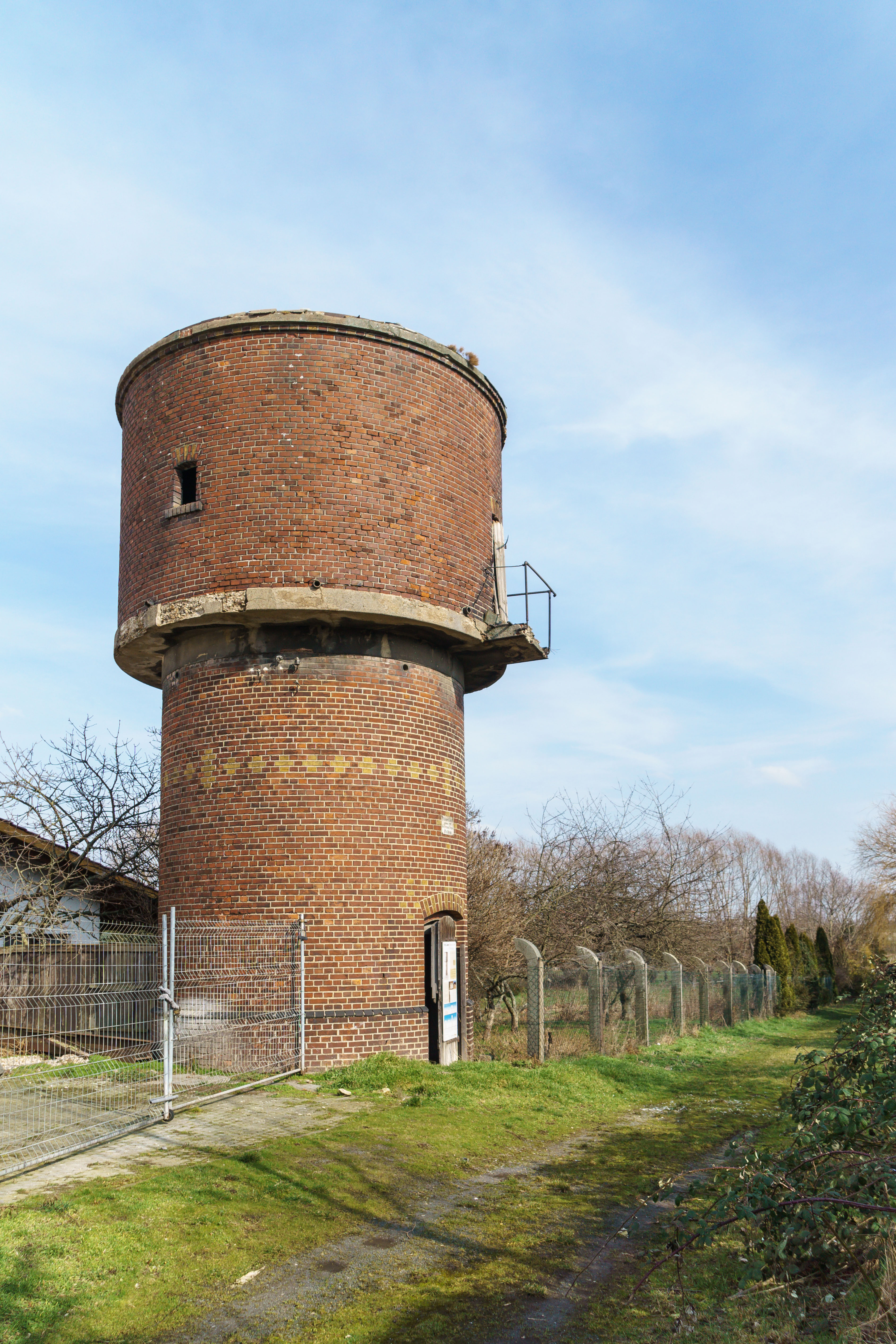 Wasserturm, Kirchweg in Wurzen OT Roitzsch